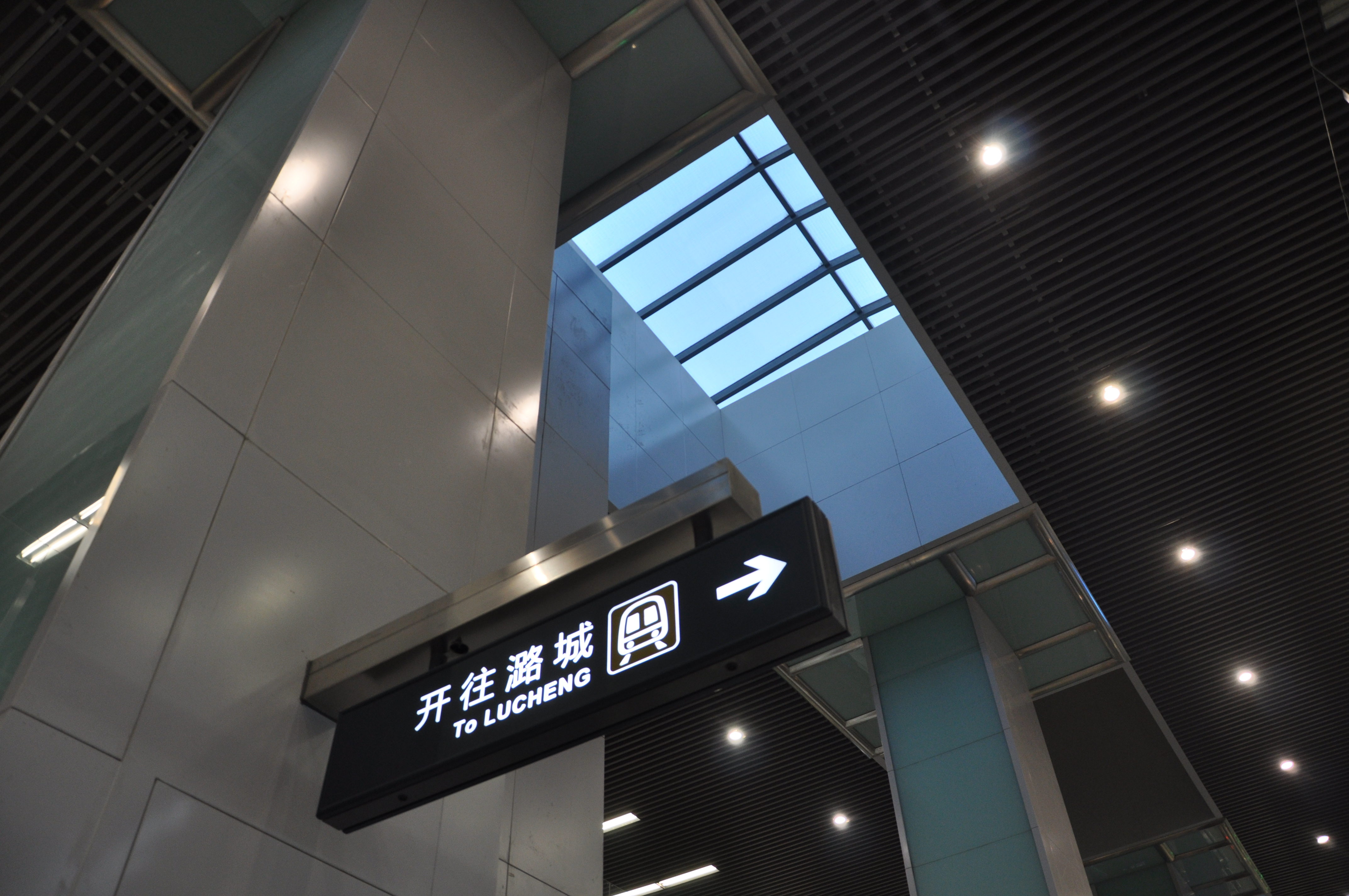 北运河西站站台，上方没有站厅层楼板。可见车站顶棚和天窗。